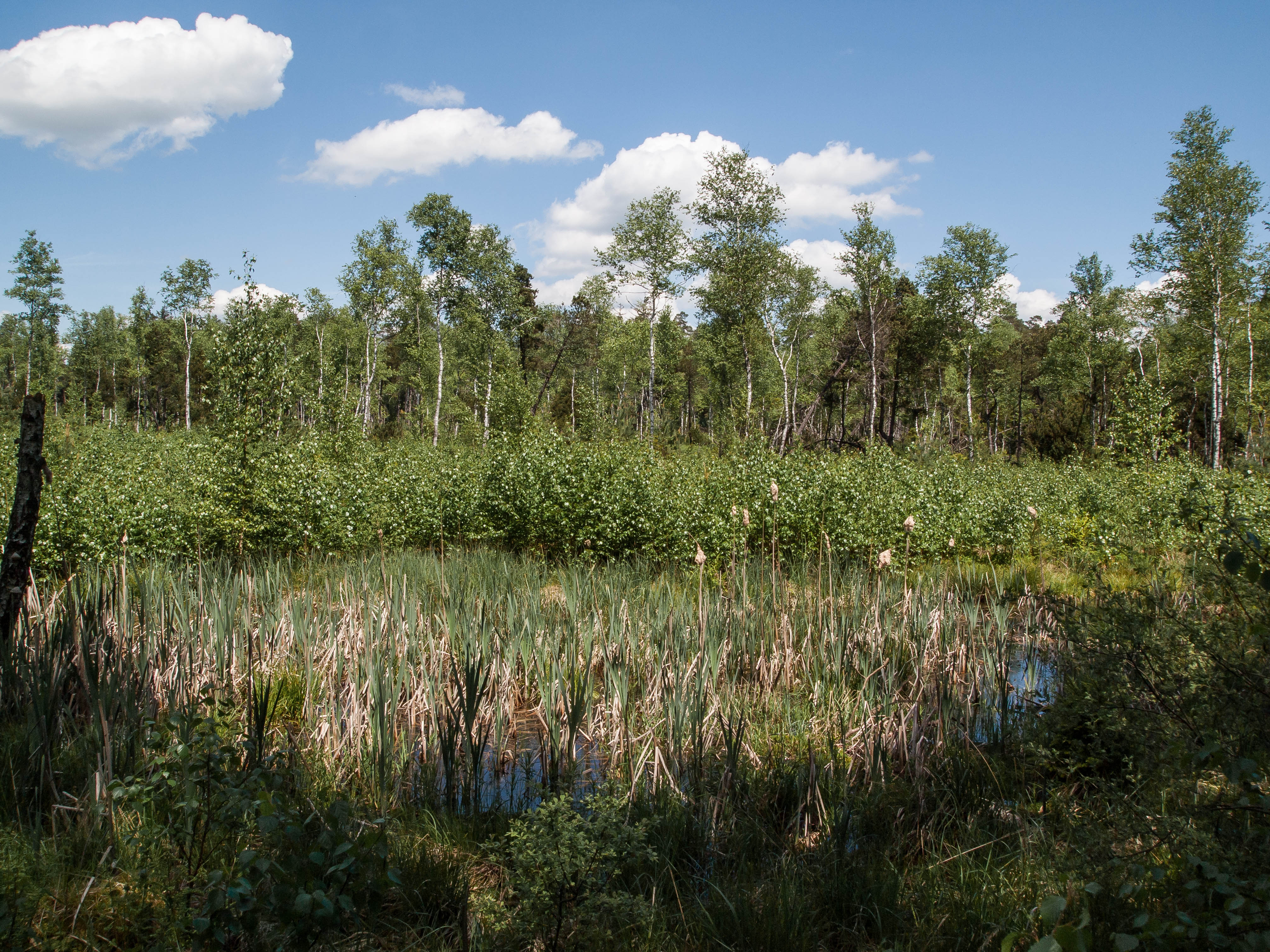 Blick von Süden auf das Flachtenbergmoor zwischen Kerschlach und Machtlfing, Oberbayern. (NSG:BY-NSG-00053.01)_Flachtenbergmoor